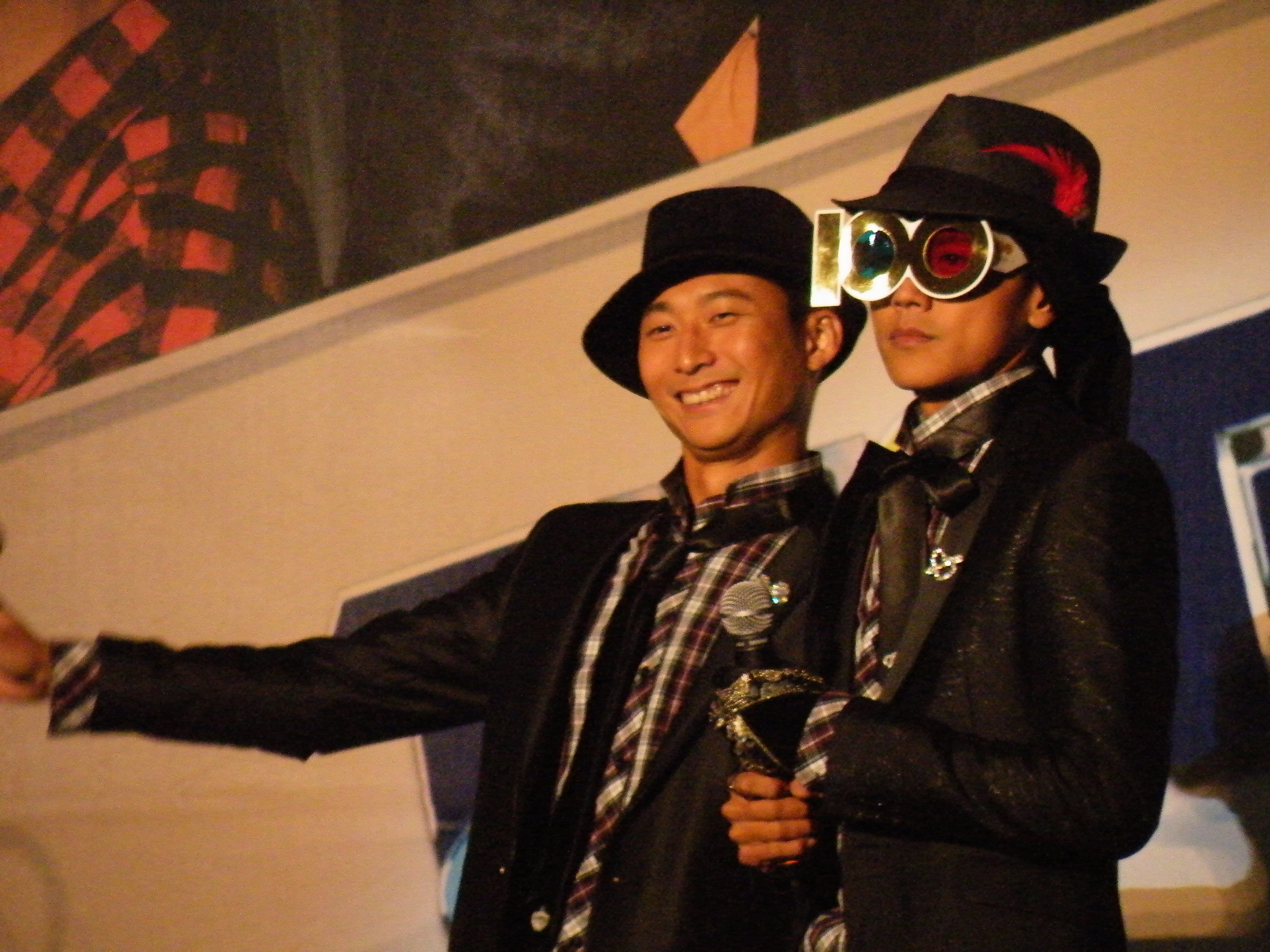 浩角翔起在台北2011年跨年晚會